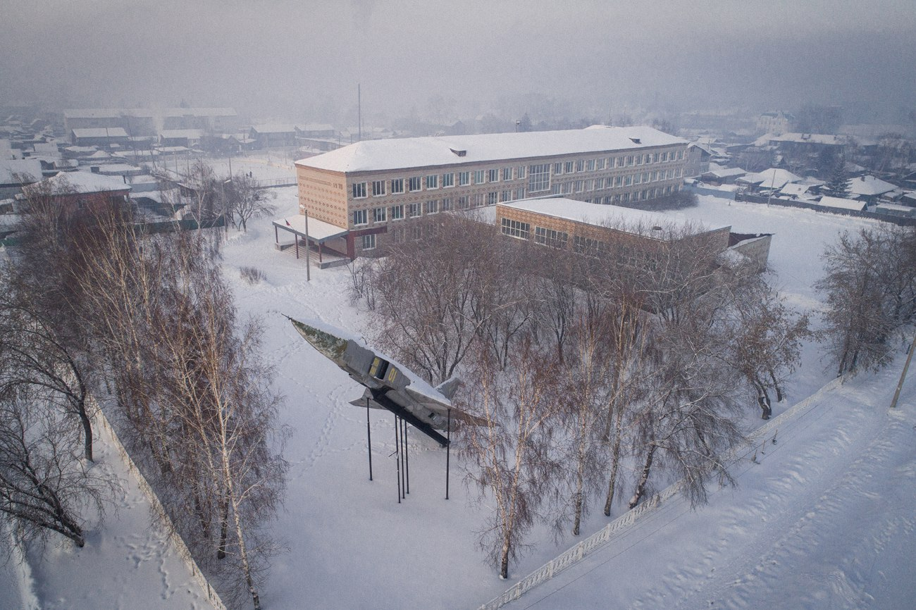 Иланская средняя школа № 1 имени Халипова